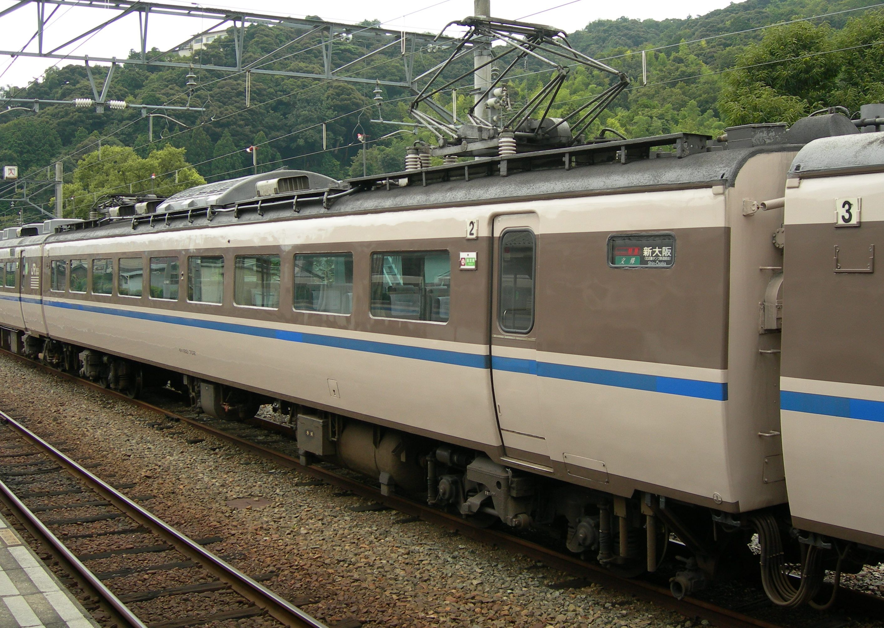 JR西日本 183系700番台